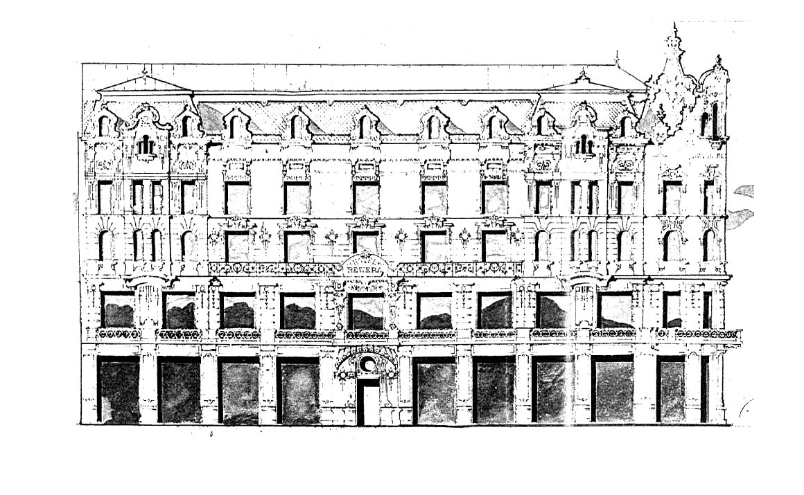 Нереалізований проект дому Станіслава Хованця на вулиці Сапежинській в Станиславові (нині вул. Незалежності в Івано-Франківську). Архітектор Ян Томаш Кудельський. Нині на його місці будинок зведений за проектом Фридерика Януша.